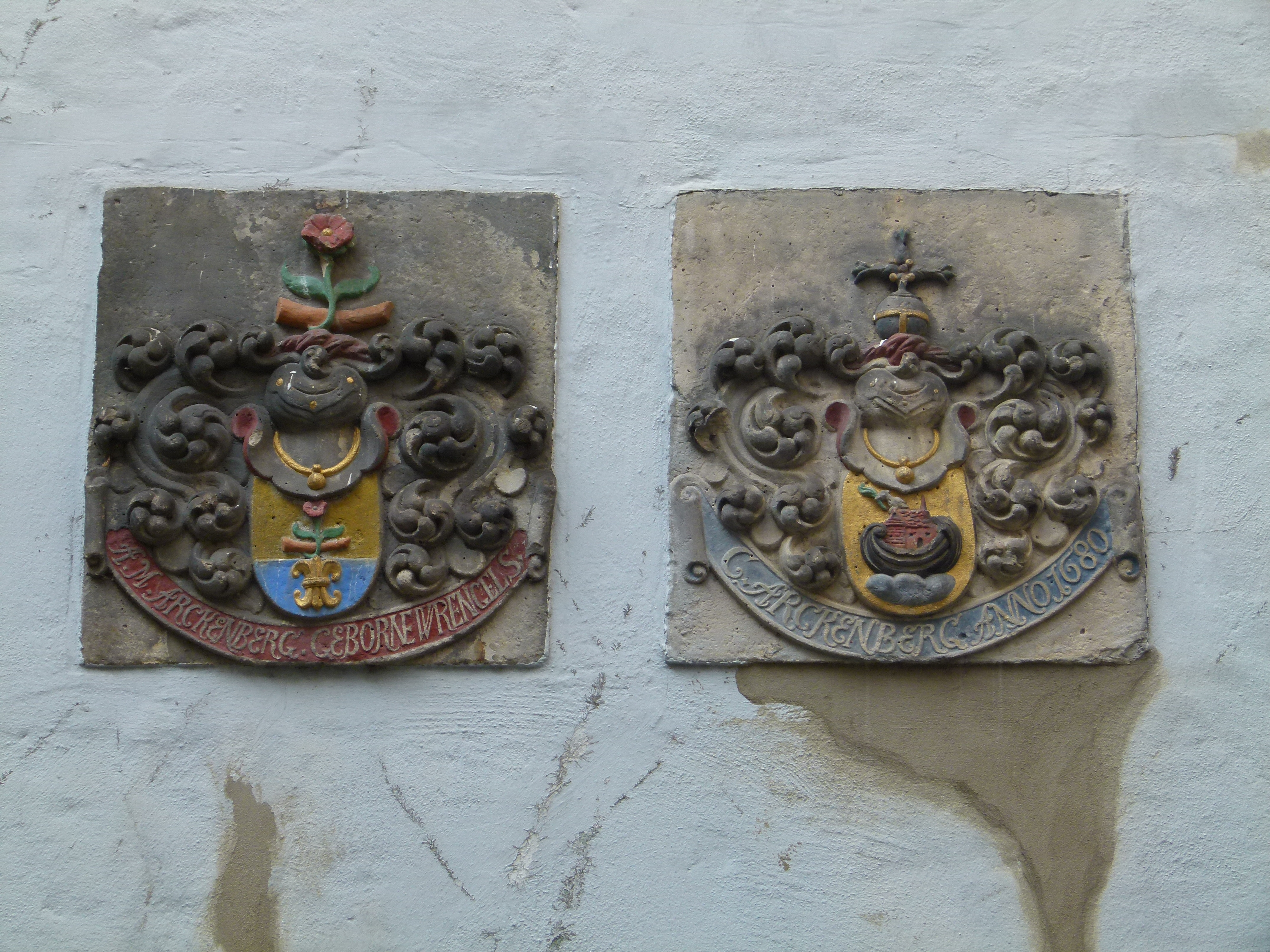 Schnoor-Viertel in Bremen